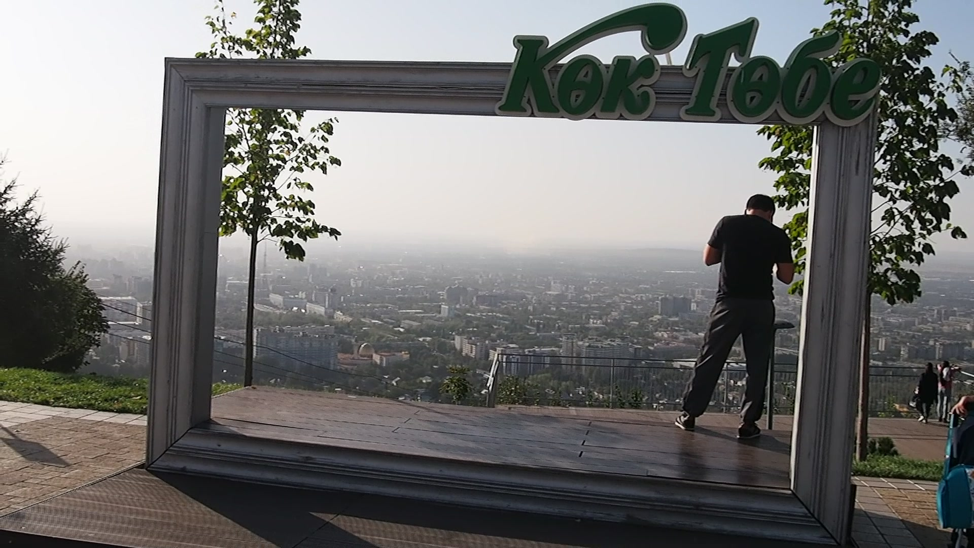 P9190593 09